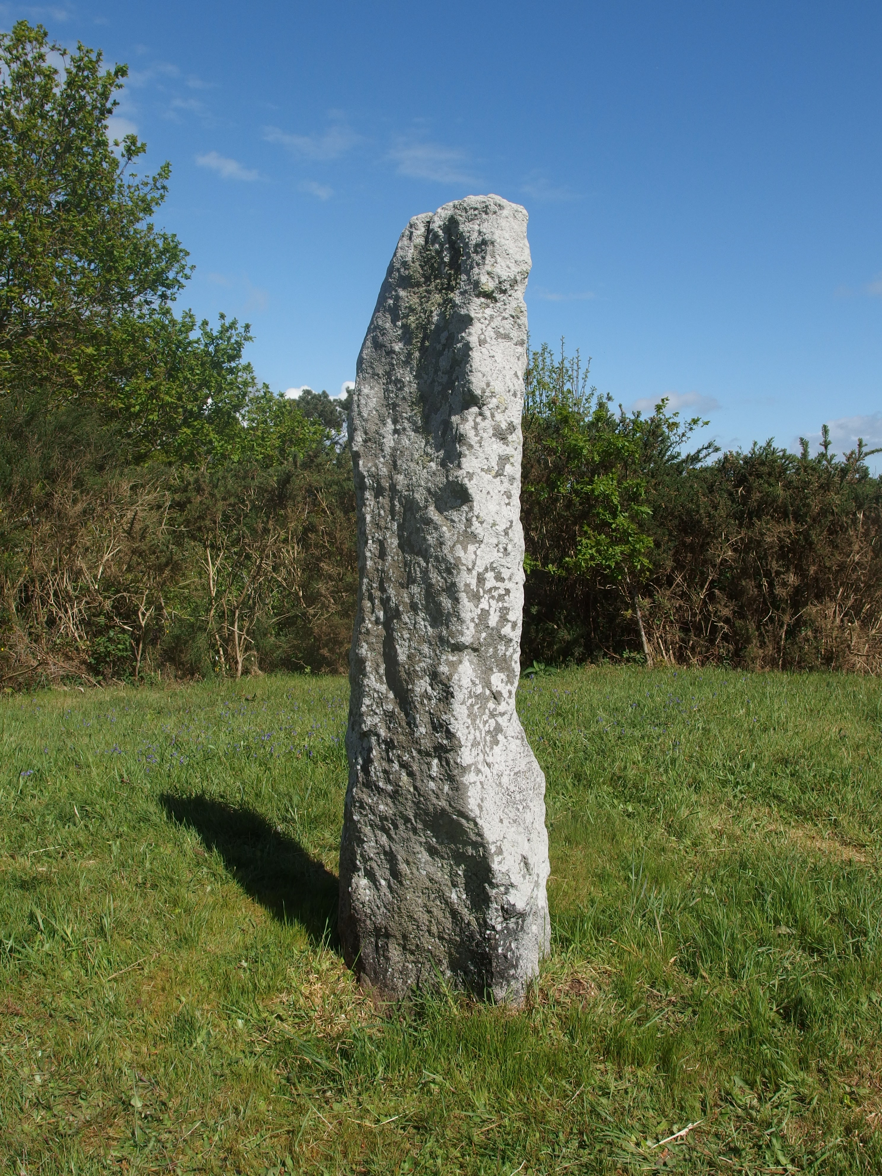 Menhir au sommet du Tumulus du Moustoir à Carnac